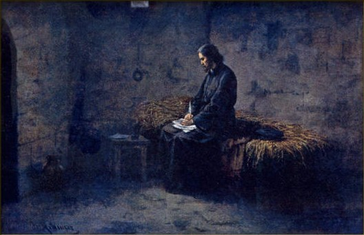 Josef Mathauser (1846-1917) - Hus ve vlhkém a tmavém vězení píše Čechům poslední svůj vzkaz